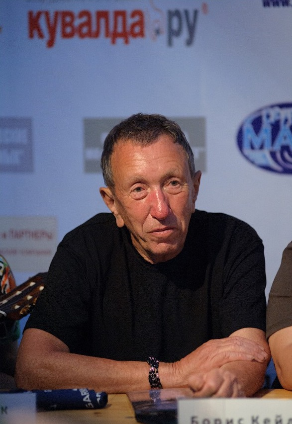 Борис Кейльман - бессменный организатор Грушинского фестиваля